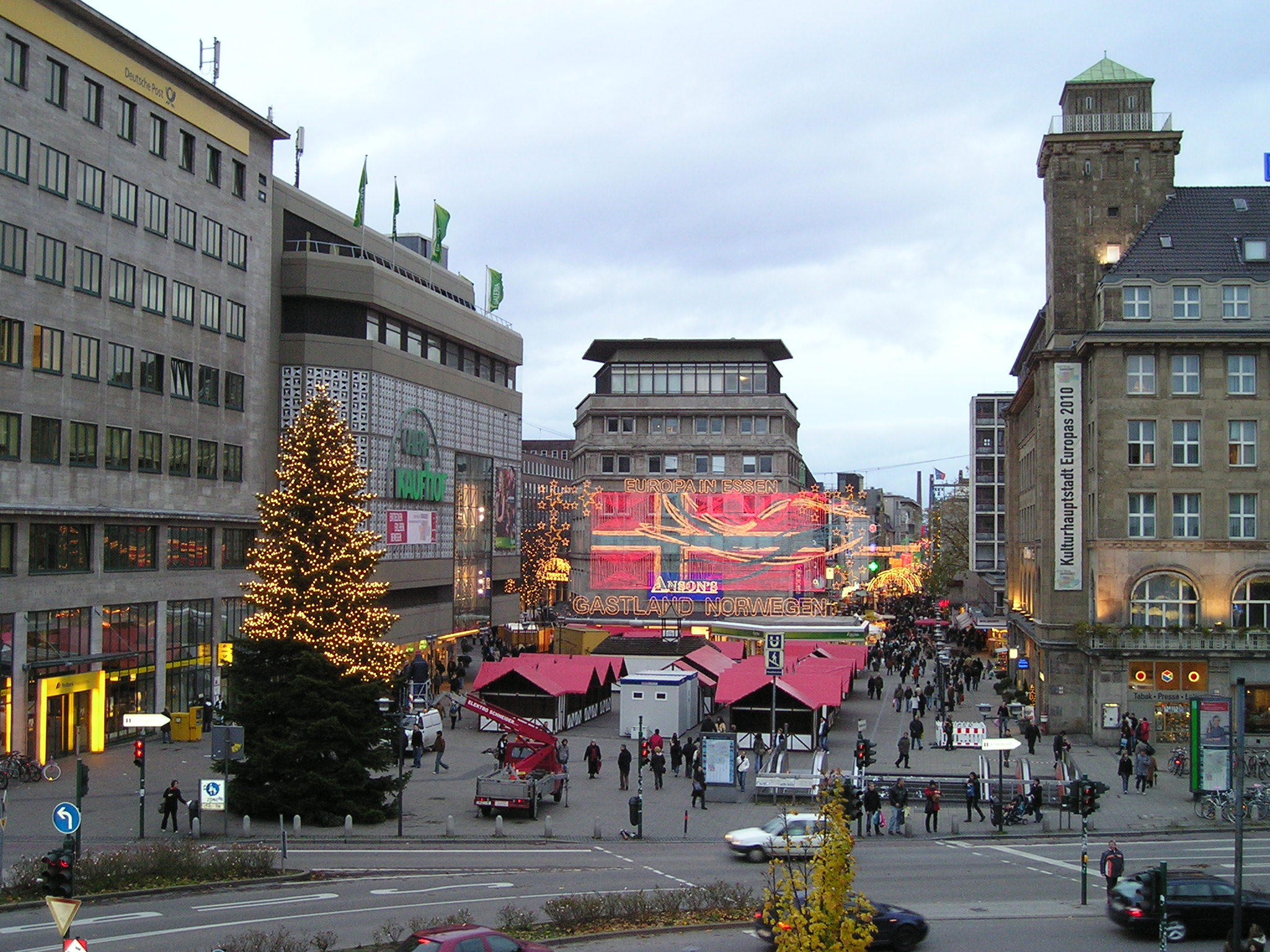 Weihnachtsbeleuchtung 2007 in Essen